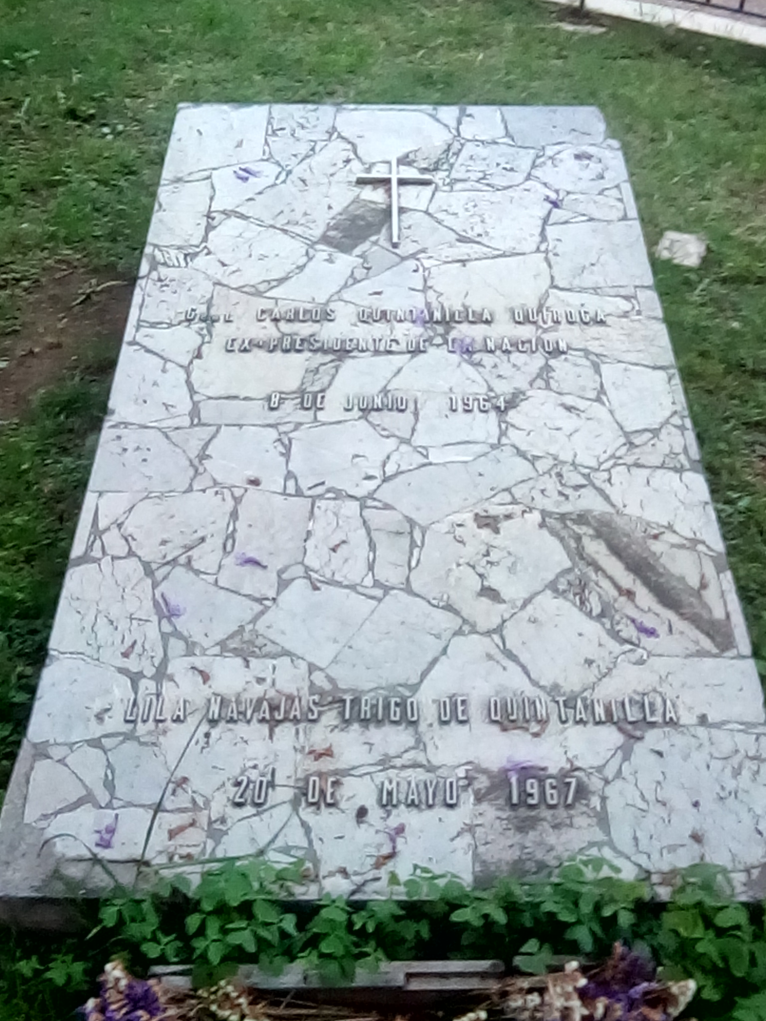 Tumba de Carlos Quintanilla Quiroga